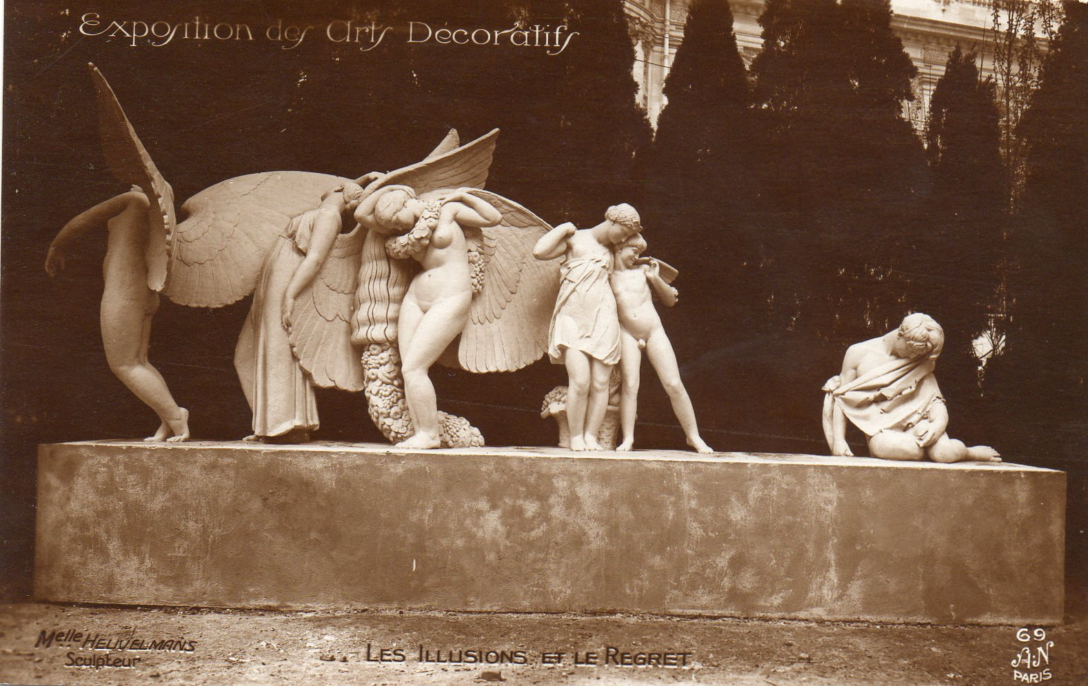 Lucienne Heuvelmans (1881-1944), Les Illusions et le Regret, Exposition internationale des Arts décoratifs et industriels modernes de 1925 à Paris. Localisation actuelle inconnue.